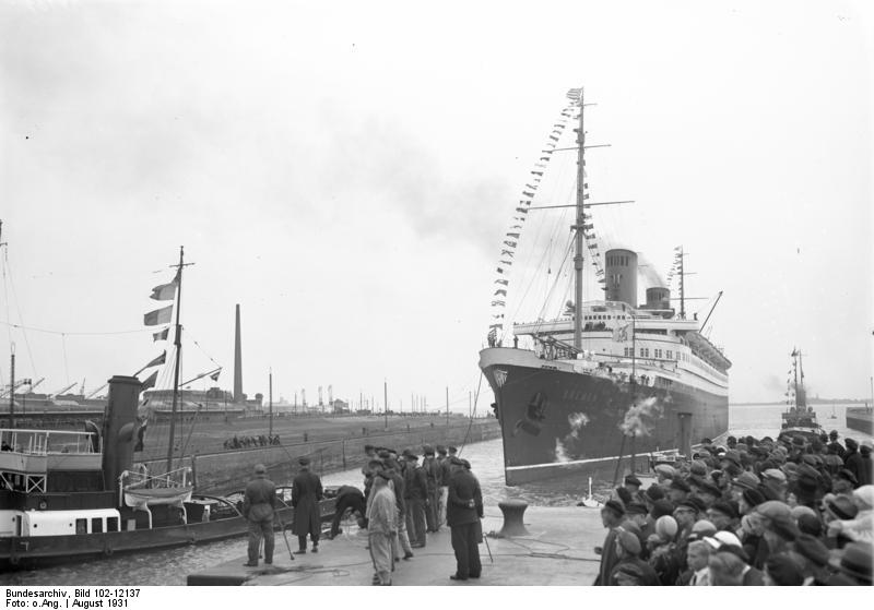 Die feierliche Einweihung der "Nordschleuse" der grössten Schleuse Europas, in Bremerhaven. Als erstes Schiff passierte der deutsche Ozeanriese "Bremen" die Schleuse. Der Bau kostete ca. 34 Millionen Mark. Der deutsche Ozeanriese "Bremen" in Flaggengala bei der feierlichen Einfahrt in die "Nordschleuse", der grössten Schleuse Europas.